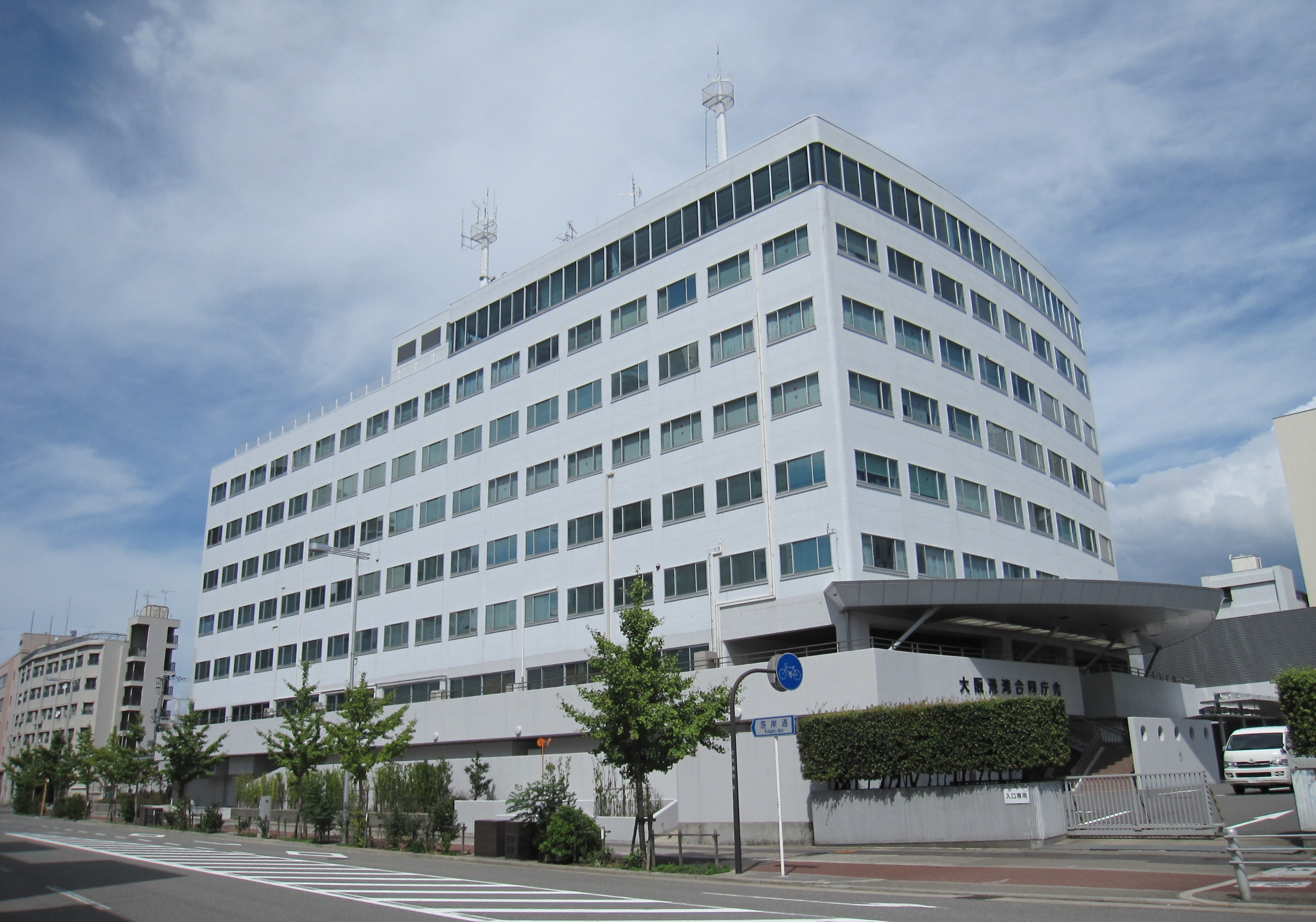 大阪港湾合同庁舎 大阪税関、第五管区海上保安本部大阪海上保安監部、大阪検疫所、神戸植物防疫所大阪支所、動物検疫所神戸支所大阪出張所